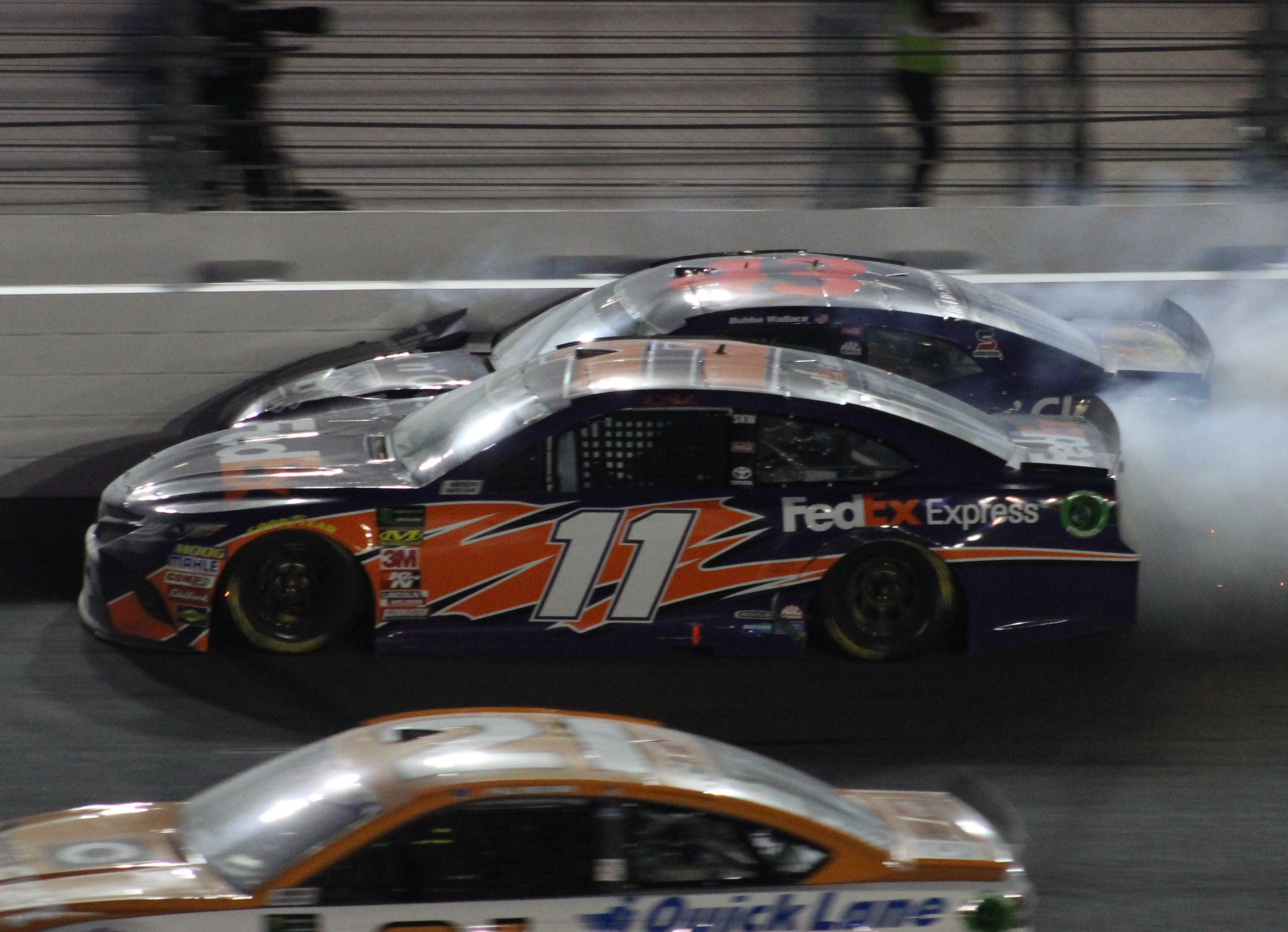 2018 Daytona 500